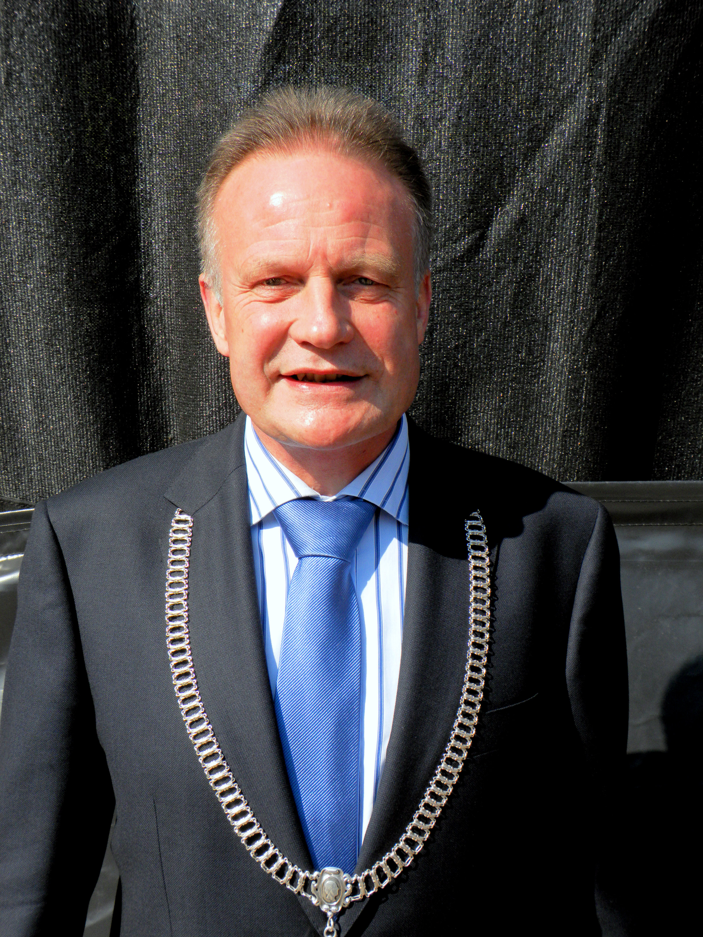 Sicko Heldoorn, burgemeester van Opsterland (2002-2007) en Assen (2007-2013)